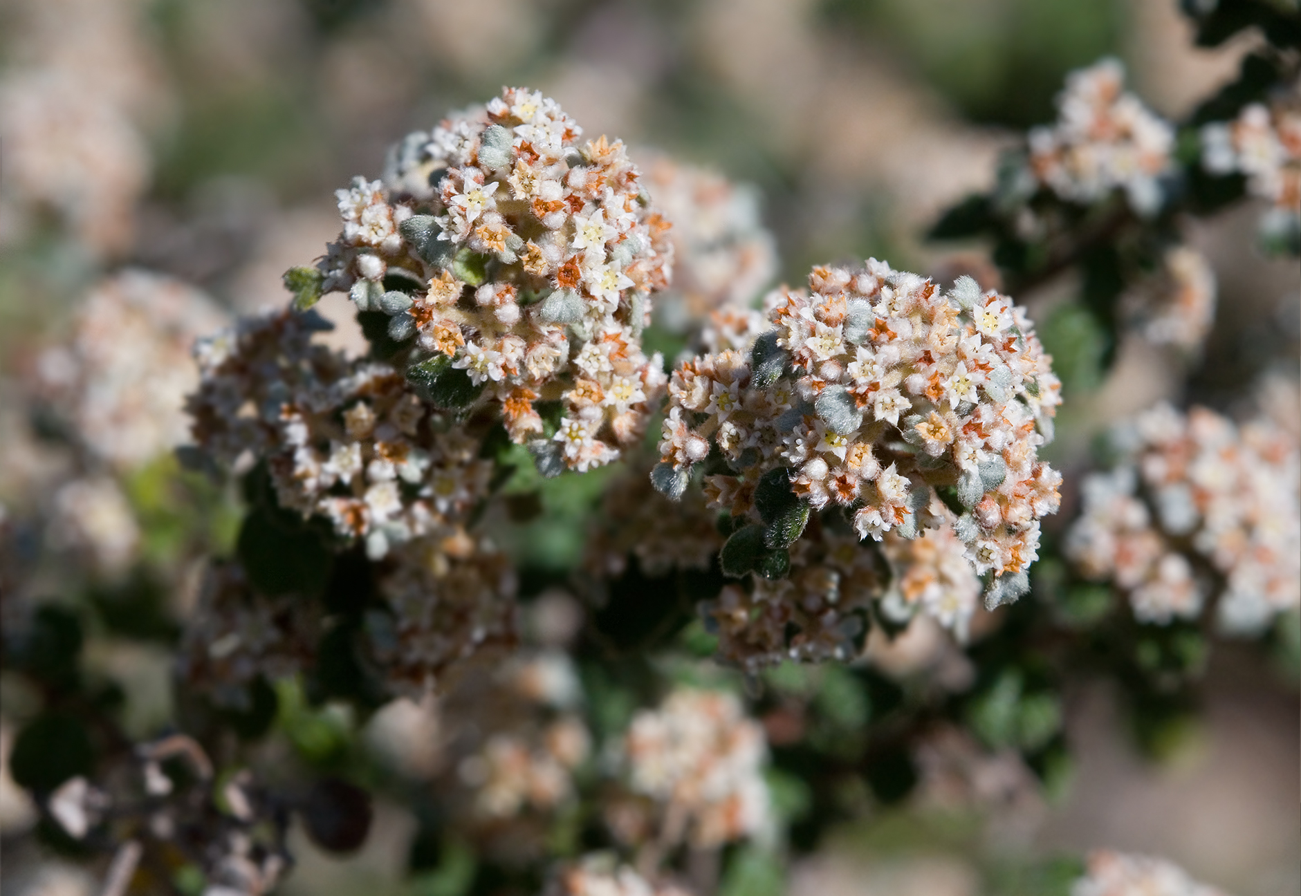 1.2 only